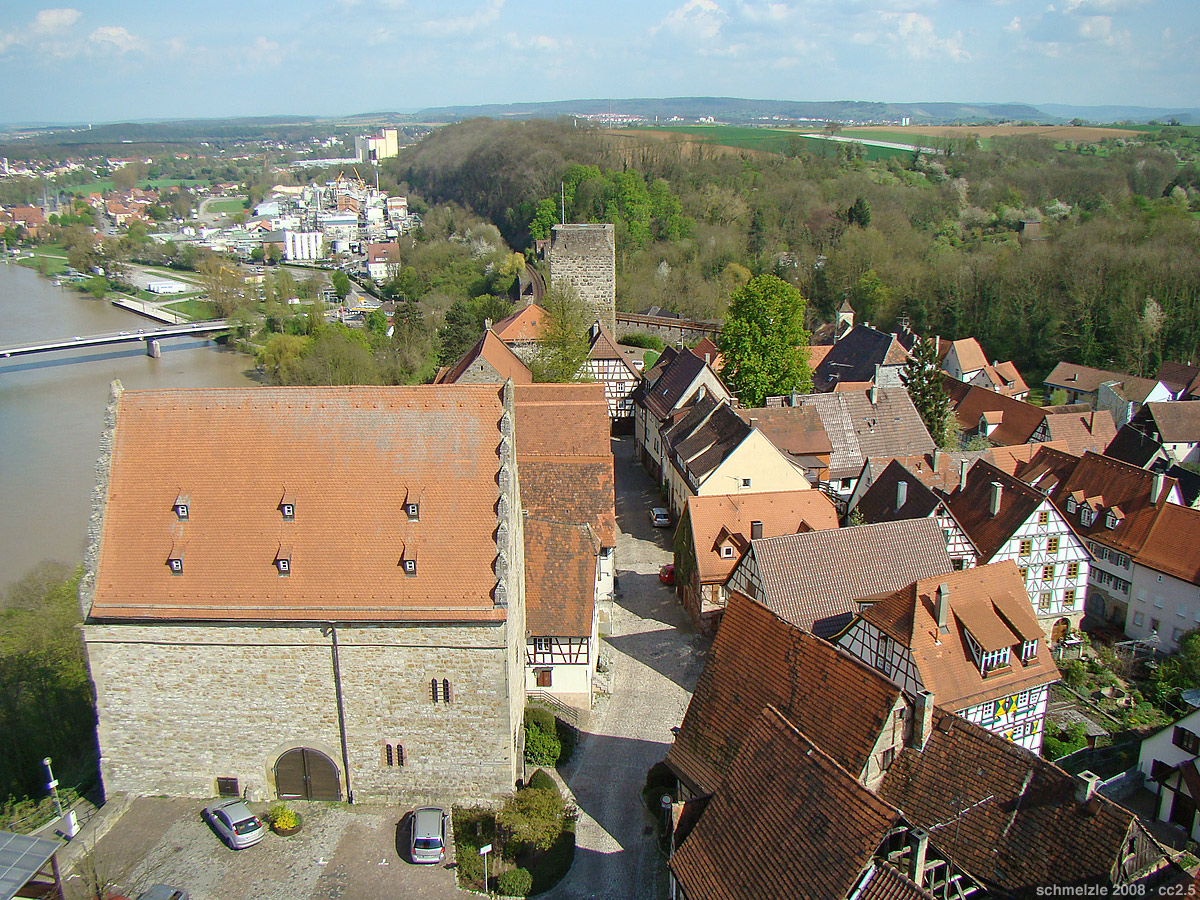 Blick vom Blauen Turm über das Burgviertel von Bad Wimpfen, die einstige Pfalz Wimpfen